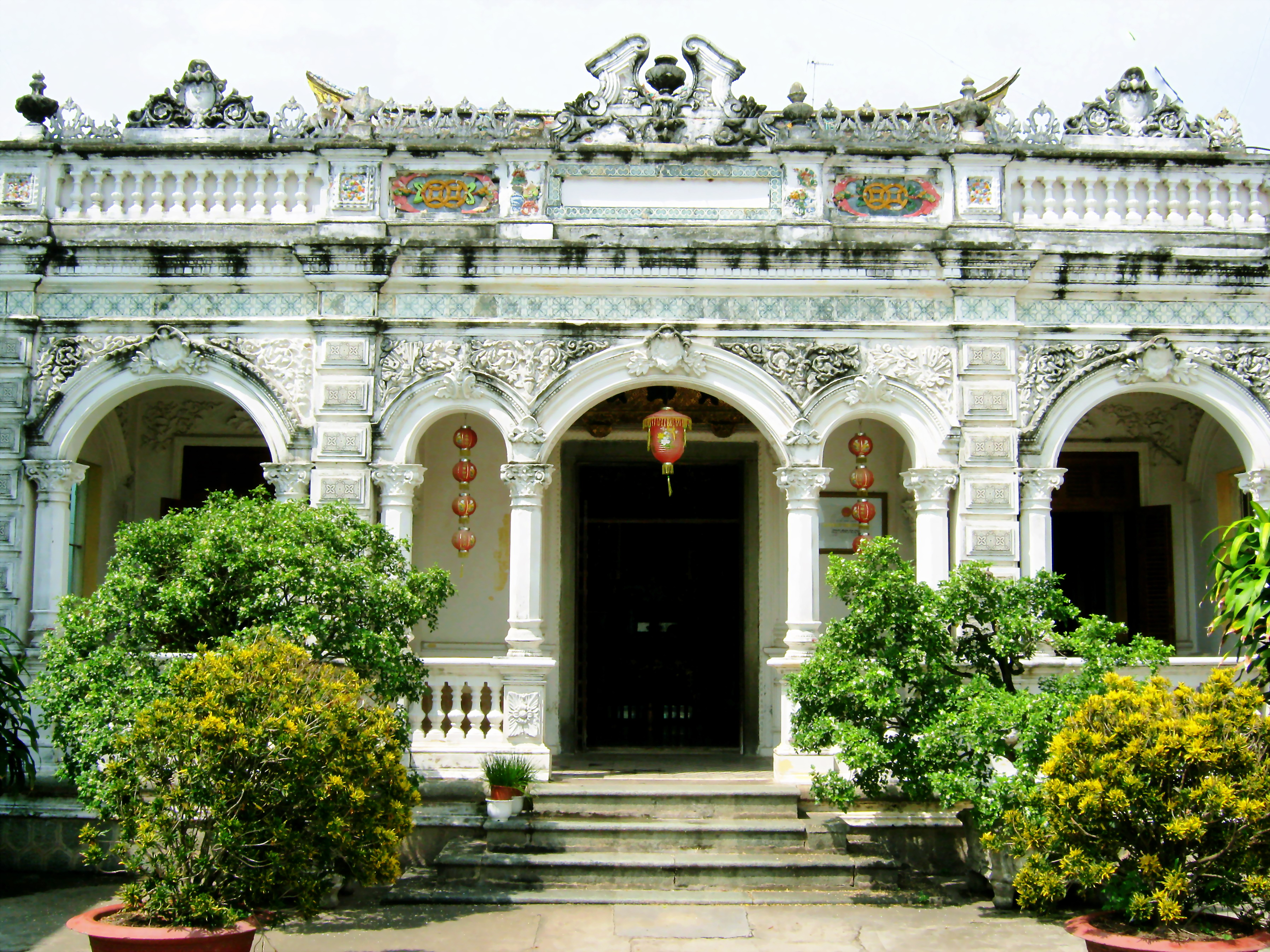 Nhà cổ Huỳnh Thủy Lê ở nội ô thành phố Sa Đéc, tỉnh Đồng Tháp, Việt Nam.